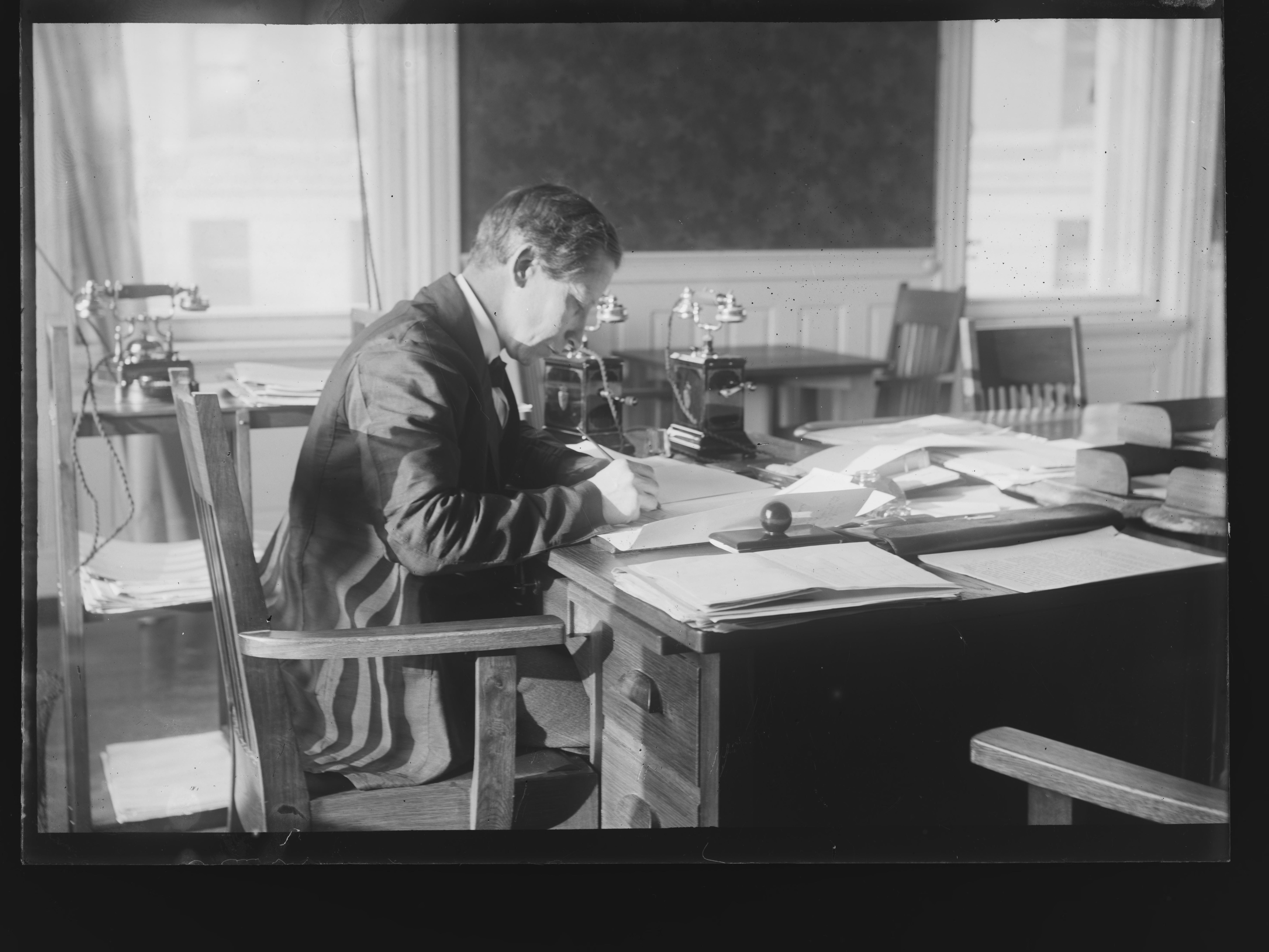 Bildet er hentet fra Nasjonalbibliotekets bildesamling. Anmerkninger til bildet var: Påskrift arkivark: Arkivnummer: 247 Oslo Depicted person: Five, Håkon